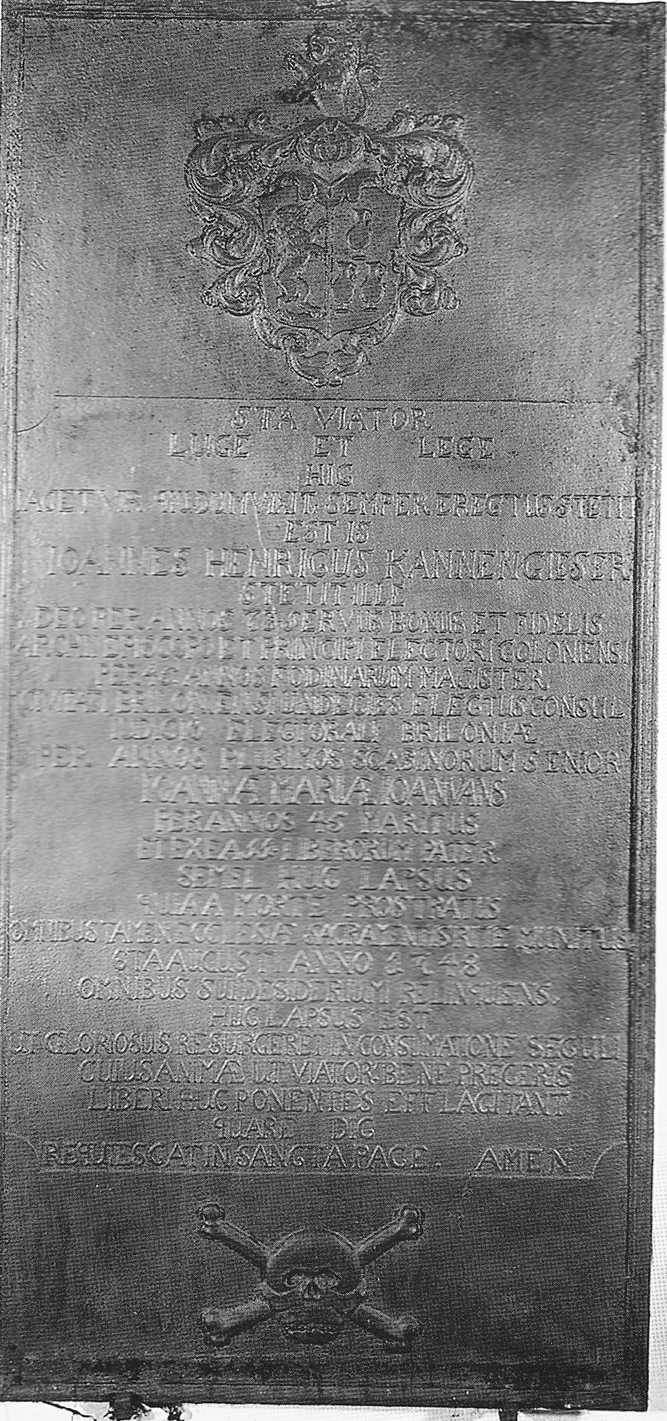 Grabplatte des J. H. Kannegießer, Brilon Propsteikirche